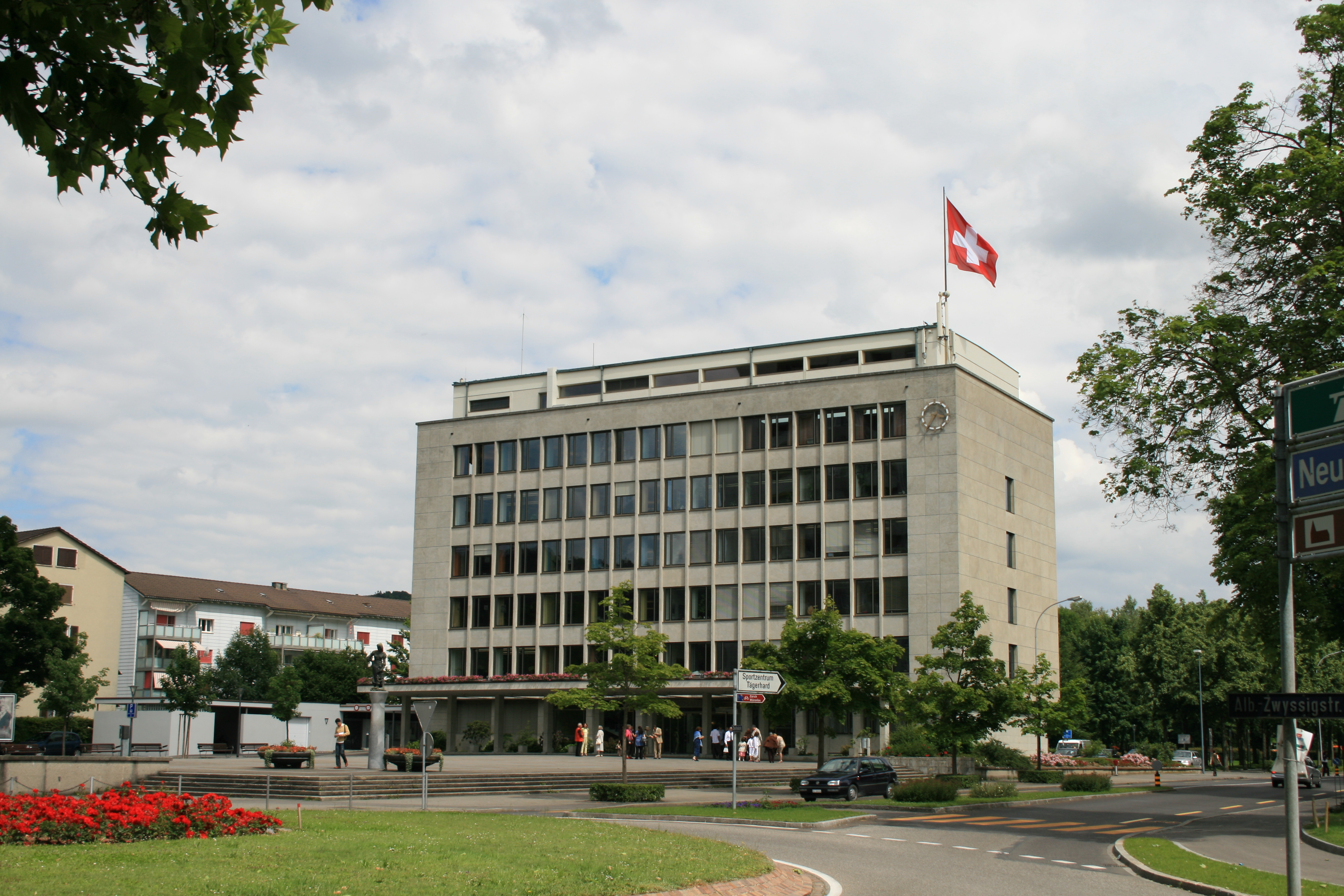 Rathaus Wettingen, Schweiz